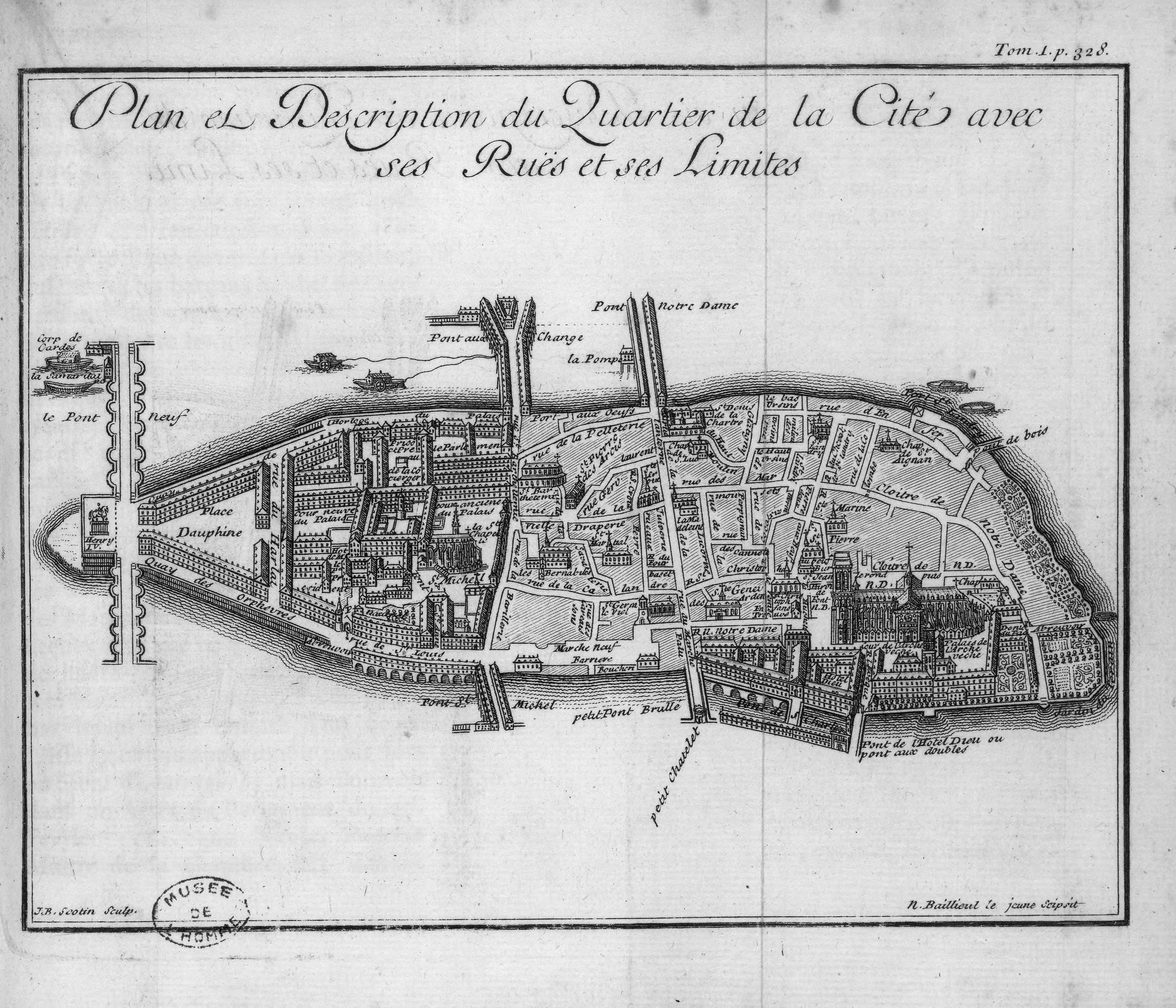 Plan et description du quartier de la Cité, avec ses rues et ses limites, par Jean-Baptiste Scotin (1678-17..) [avant 1710, année de la disparition du pont de Bois dont l'amorce est visible près du port Saint-Landry.]